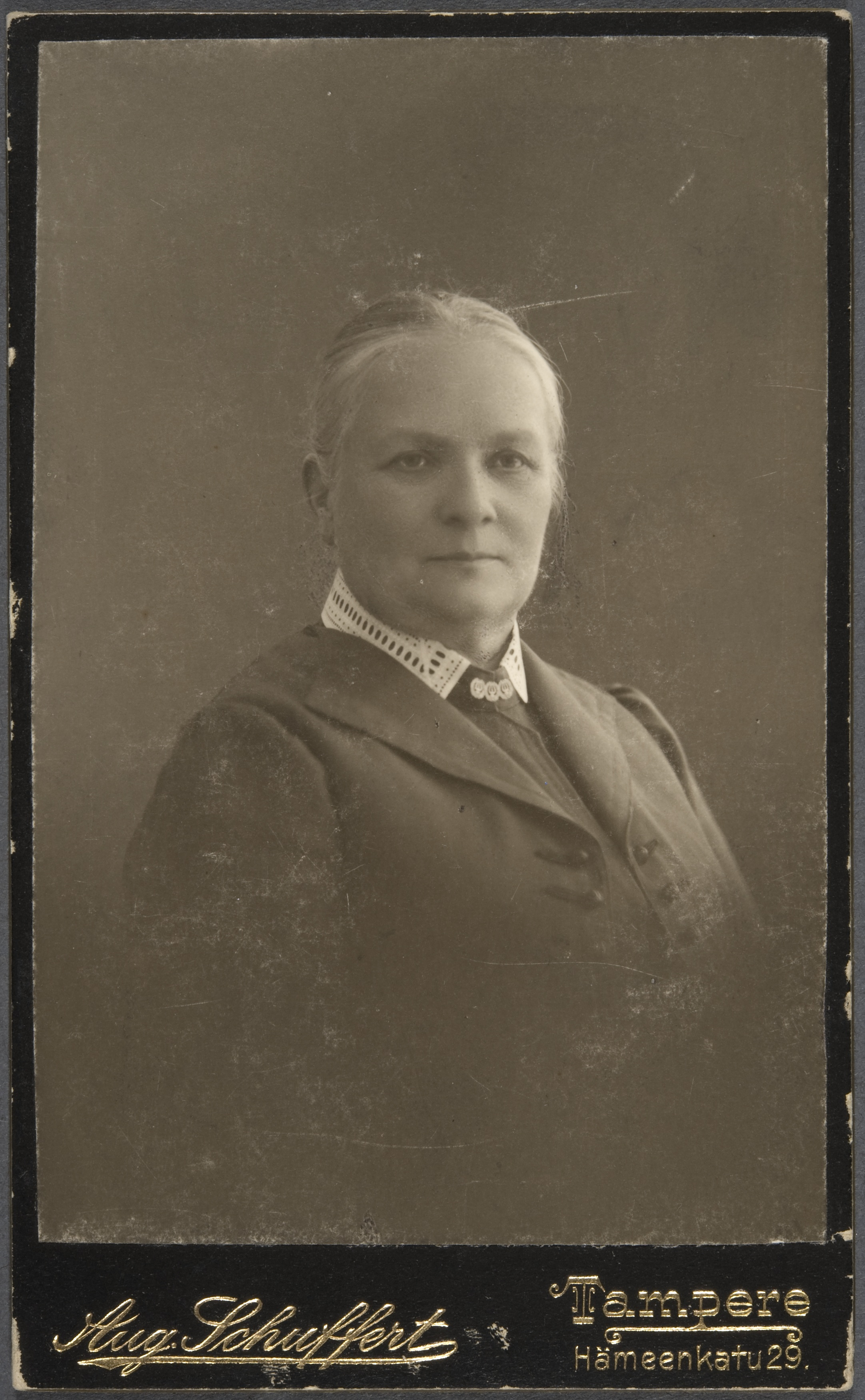 Iida Yrjö-Koskinen, kansanedustaja, kotitalouskasvatuksen ja naisasialiikkeen edistäjä; pysty, mustavalkoinen